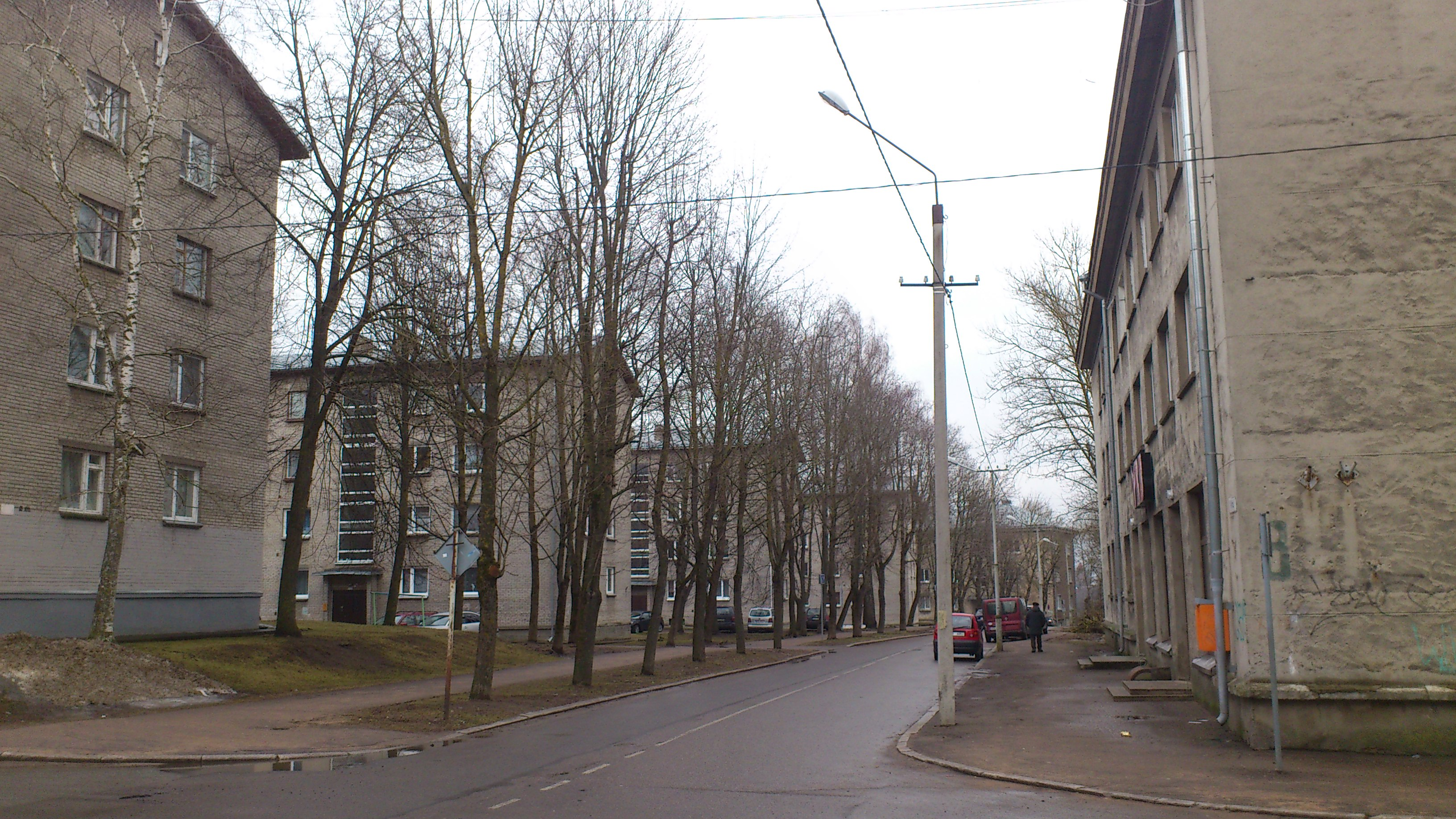 Narva. Viru tänav